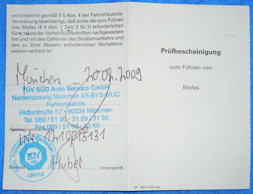 Prüfbescheinigung zum Führen von Mofas, ausgestellt am 20. Februar 2009 vom TÜV SÜD Sichtbar: Vorder- und Rückseite, Ausstellungsort und -datum, Stempel der bescheinigenden Stelle (TÜV oder DEKRA), Unterschrift des Prüfers Innen, nicht sichtbar: Familienname, Vornamen, Geburtsdatum, Anschrift, Lichtbild mit Stempel der bescheinigenden Stelle, Unterschrift des Geprüften